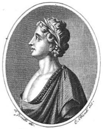 Gelone - Primo Re di Siracusa in un ritratto di Giuseppe Emanuele Ortolani nel suo librio sulle biografie degli uomini illustri di Sicilia